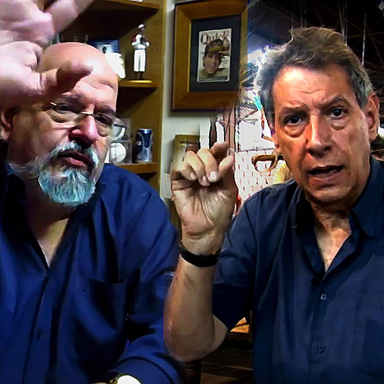 Autores de País portátil